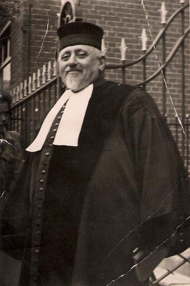 הרב שמואל יהודה הירש תרל"ג - תש"א